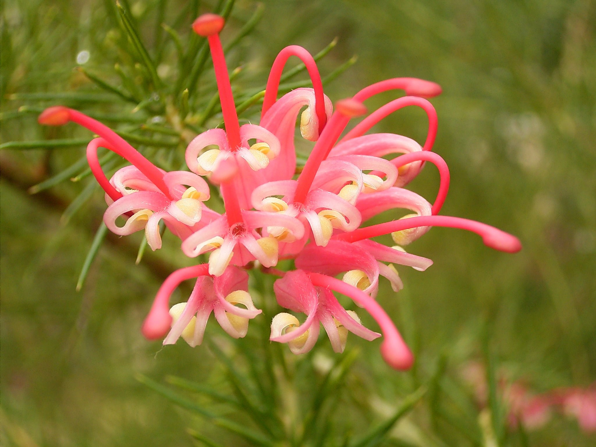 Grevillea rosmarinifolia